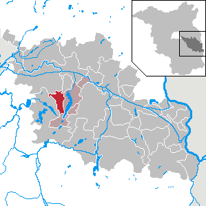 Reichenwalde in Brandenburg (Country) - District Oder-Spree